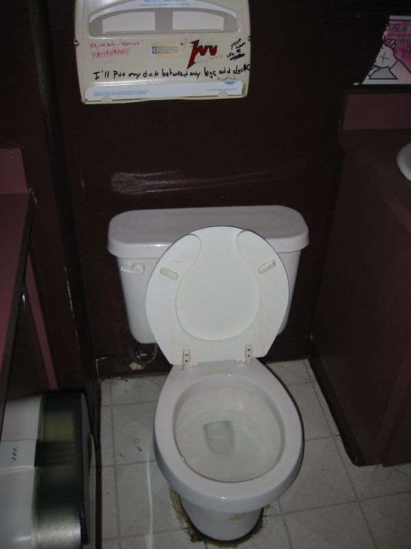 Toilet, Bonfire Lounge, Oregon